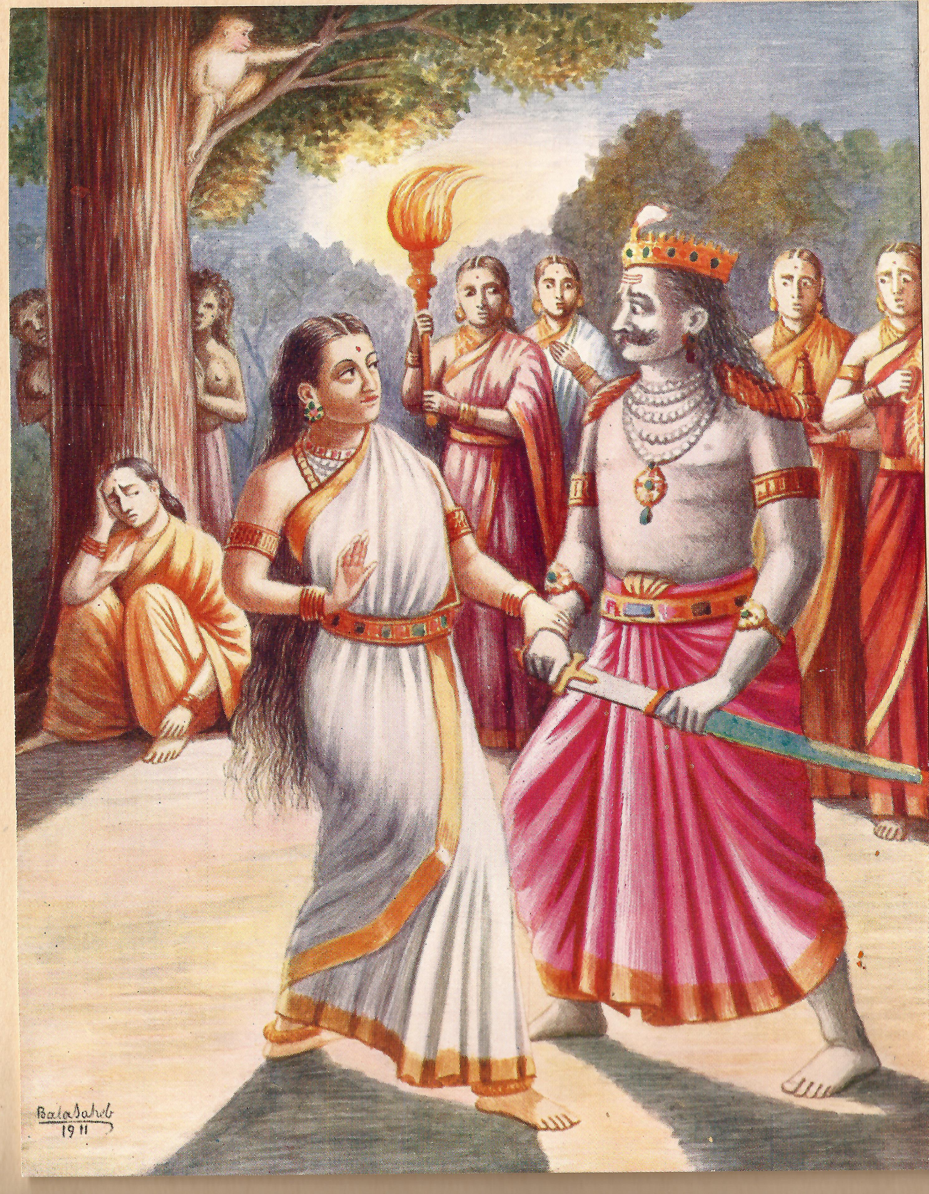 Chitra Ramayana (Illustrated Ramayana) is a simplified story of the great Indian epic in Kannada. The type is bold and beautiful. The thick pages have become brittle and need careful handling. Printed by B. Miller, Superintendent, British India, Press, Mazgaon, Bombay. It was published by, Shrimat Balasaheb Pandit Pant Pratinidhi, chief of Aundh, at Aundh, Satara district. The Kannada version is by Ramachandra Madhwa Mahishi The date shown is 1916. It is all the more important because the book contains illustrations painted by the publisher also called Bhavan Rao Shrinivas Rao, the ruler of the state of Aundh himself.